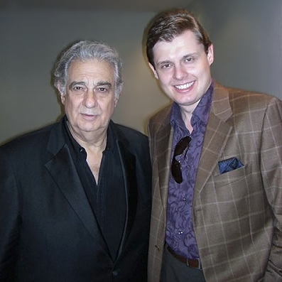 Пласидо Доминго и Евгений Понасенков в Москве.